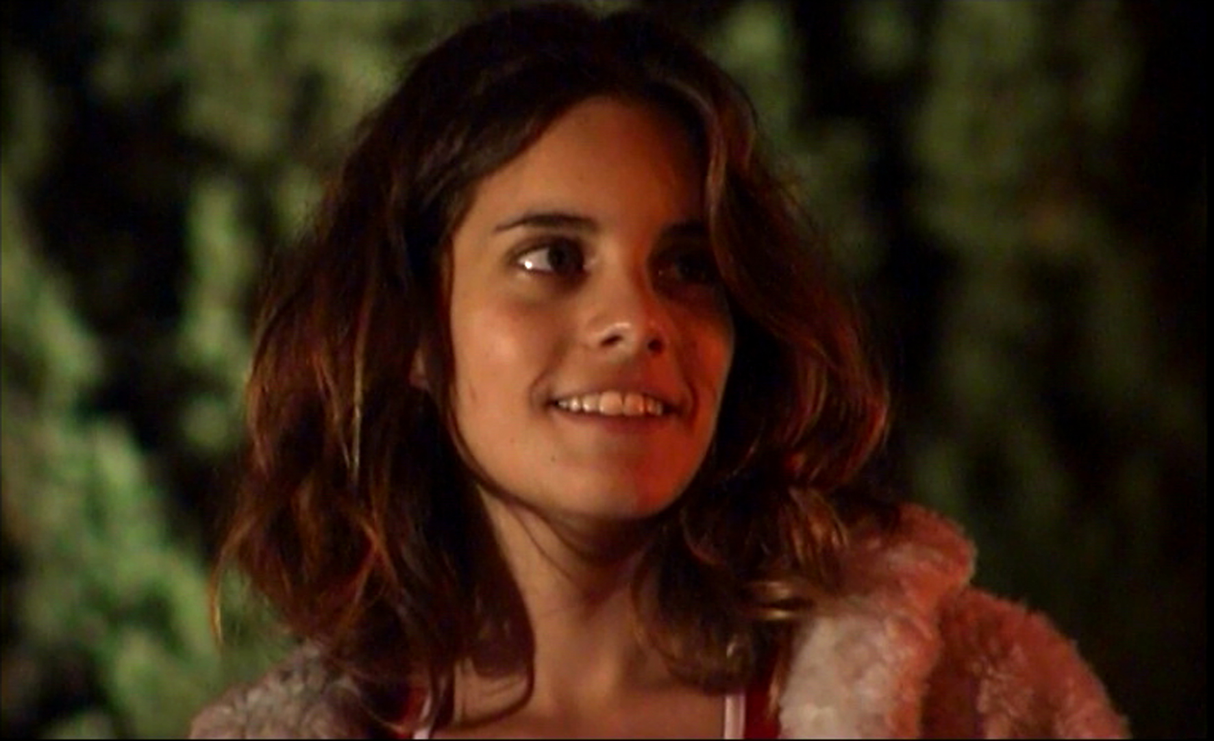 הילי ילון בסרטם של ינאי גוז ויוני זיכהולץ "אלנבי רומאנס", 2005